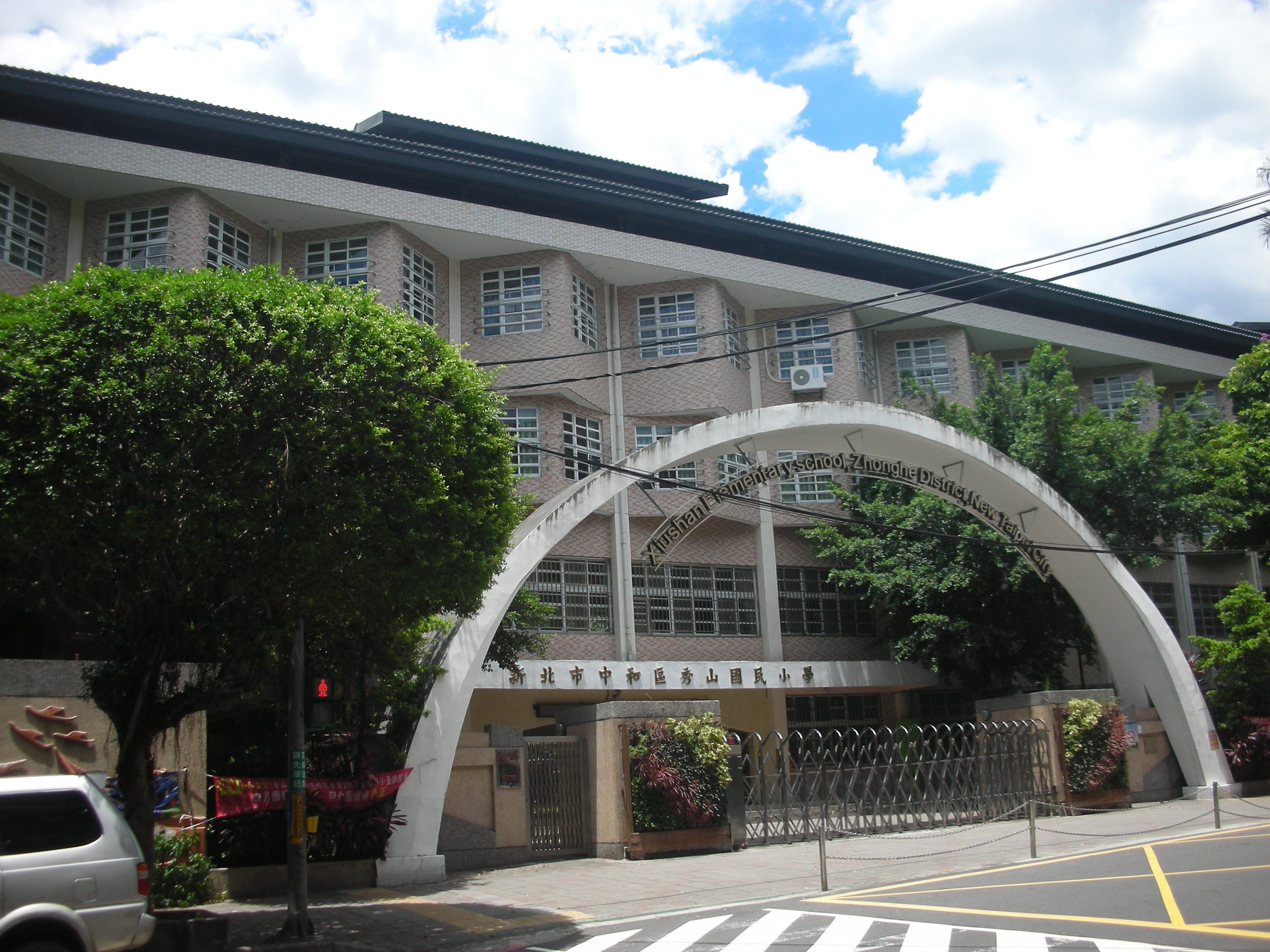 新北市立秀山國民小學位於台灣新北市中和區立人街，緊鄰秀山公園及秀朗國小。創校於1977年。